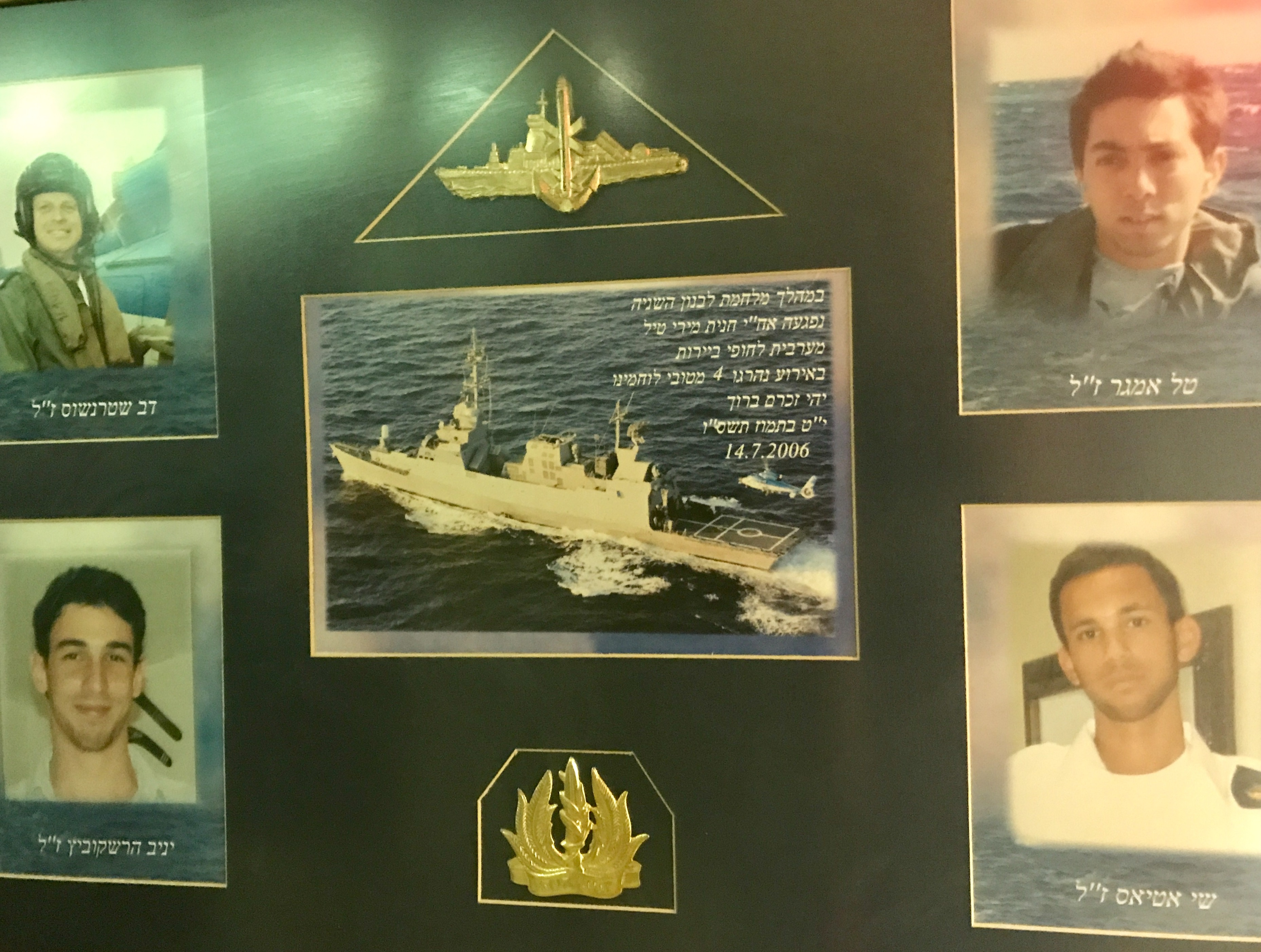 לוח הנצחה להרוגי פגיעת הטיל באח"י חנית